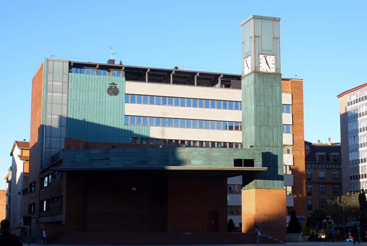 Ayuntamiento y Torre del Reloj (Barakaldo)